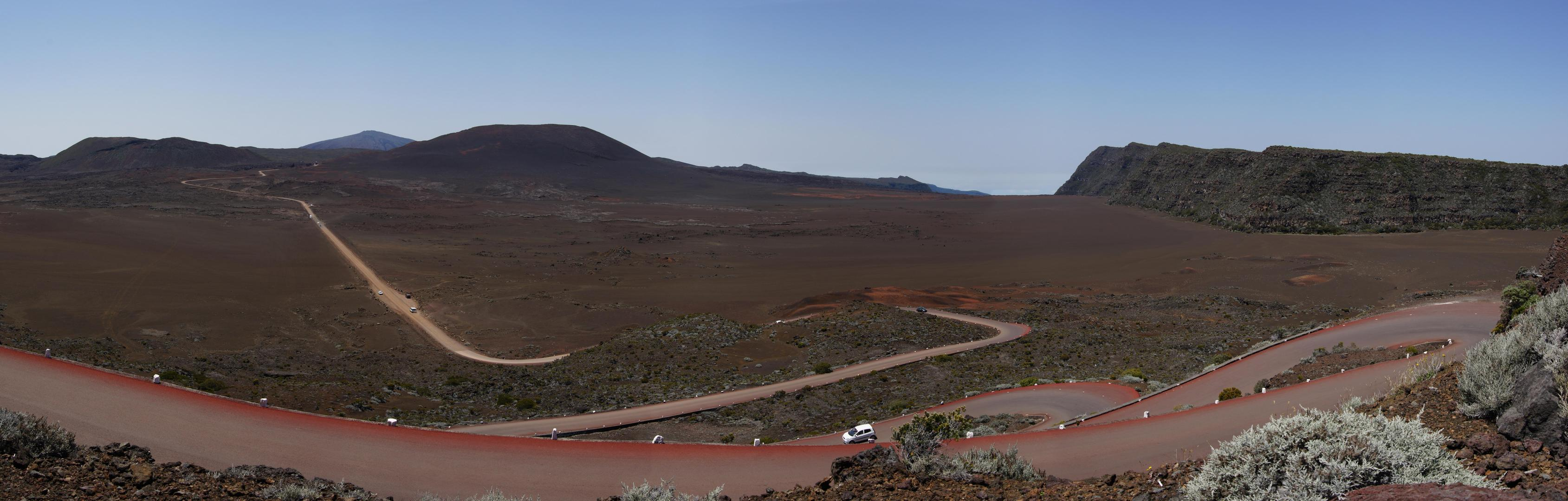 Vue panoramique de la plaine des sables. Ce panorama a été réalisé par l'assemblage de 8 photographies au format portrait.